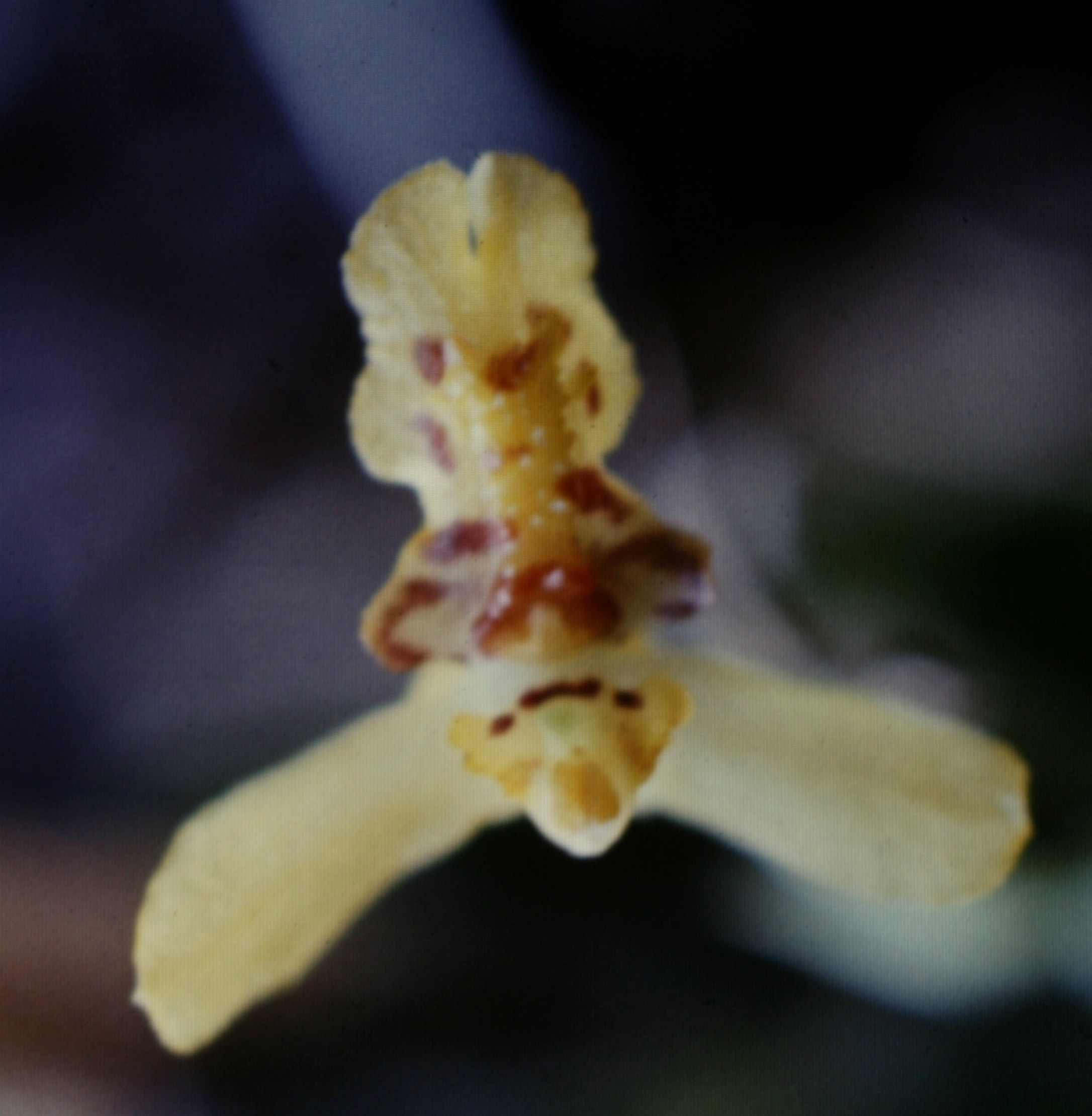 Lockhartia imbricata, Suriname.